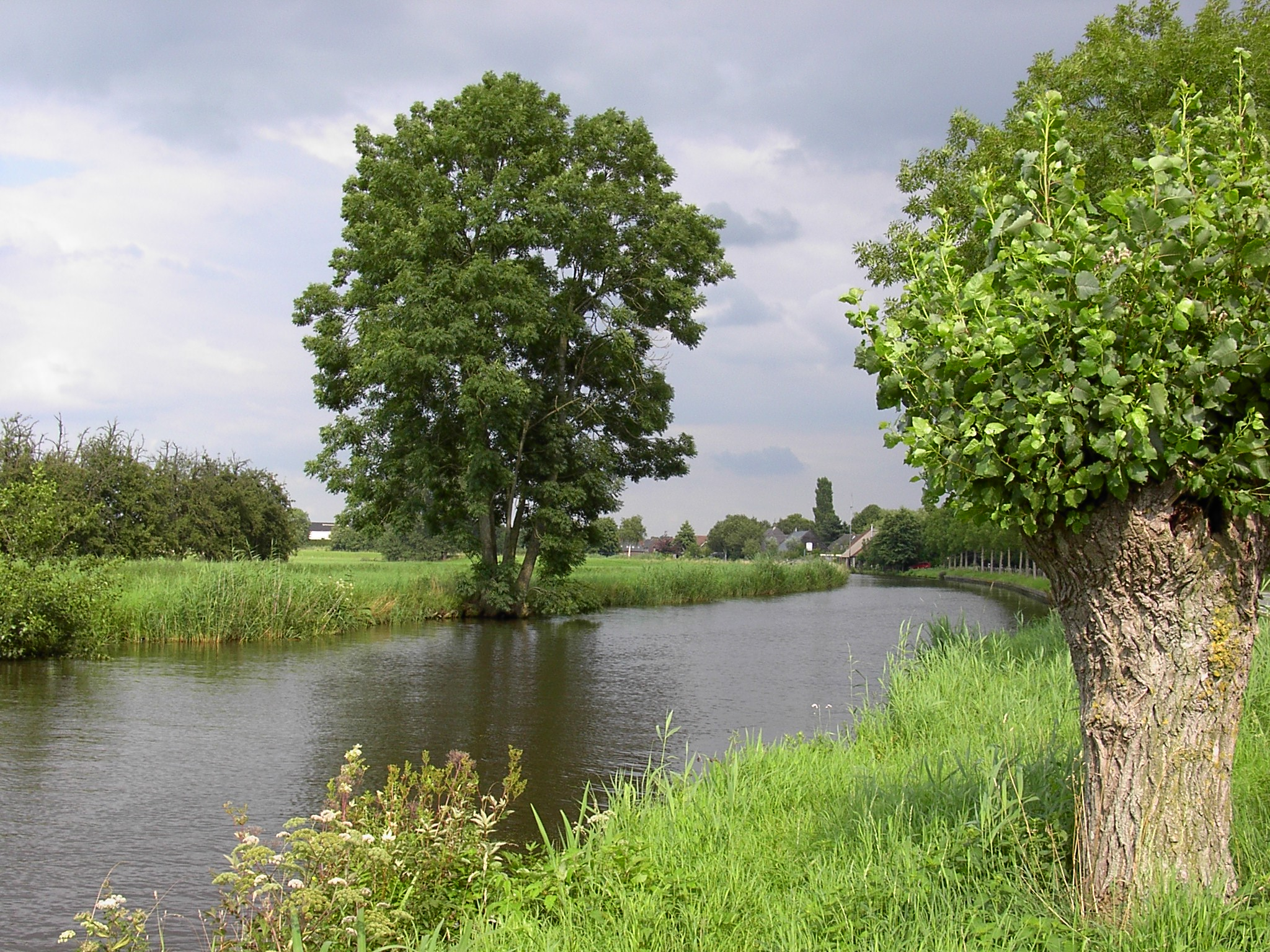 Omschrijving